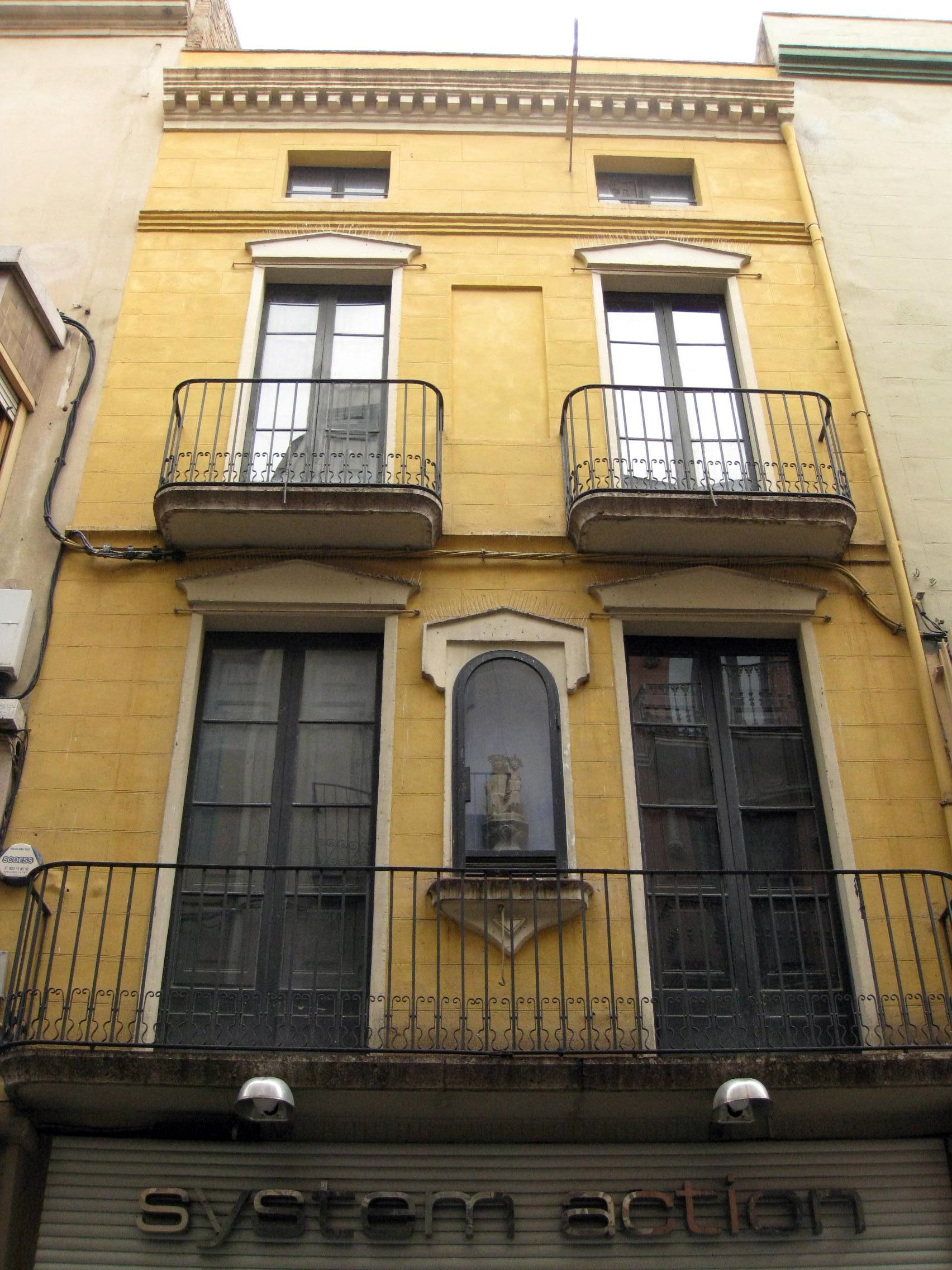 Casa al carrer Girona, 21 (Figueres)